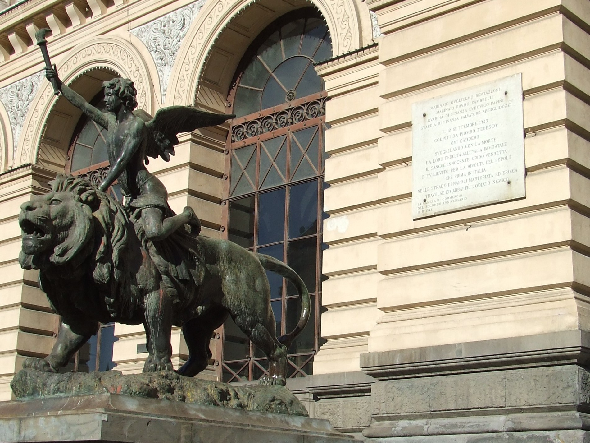 Napoli, Piazza Giovanni Bovio (ex piazza Borsa), ingresso del Palazzo della Borsa, lapide commemorativa dei fatti del 12 settembre 1943 in cui persero la vita 2 marinai e 2 finanzieri, uccisi dalle truppe di occupazione naziste